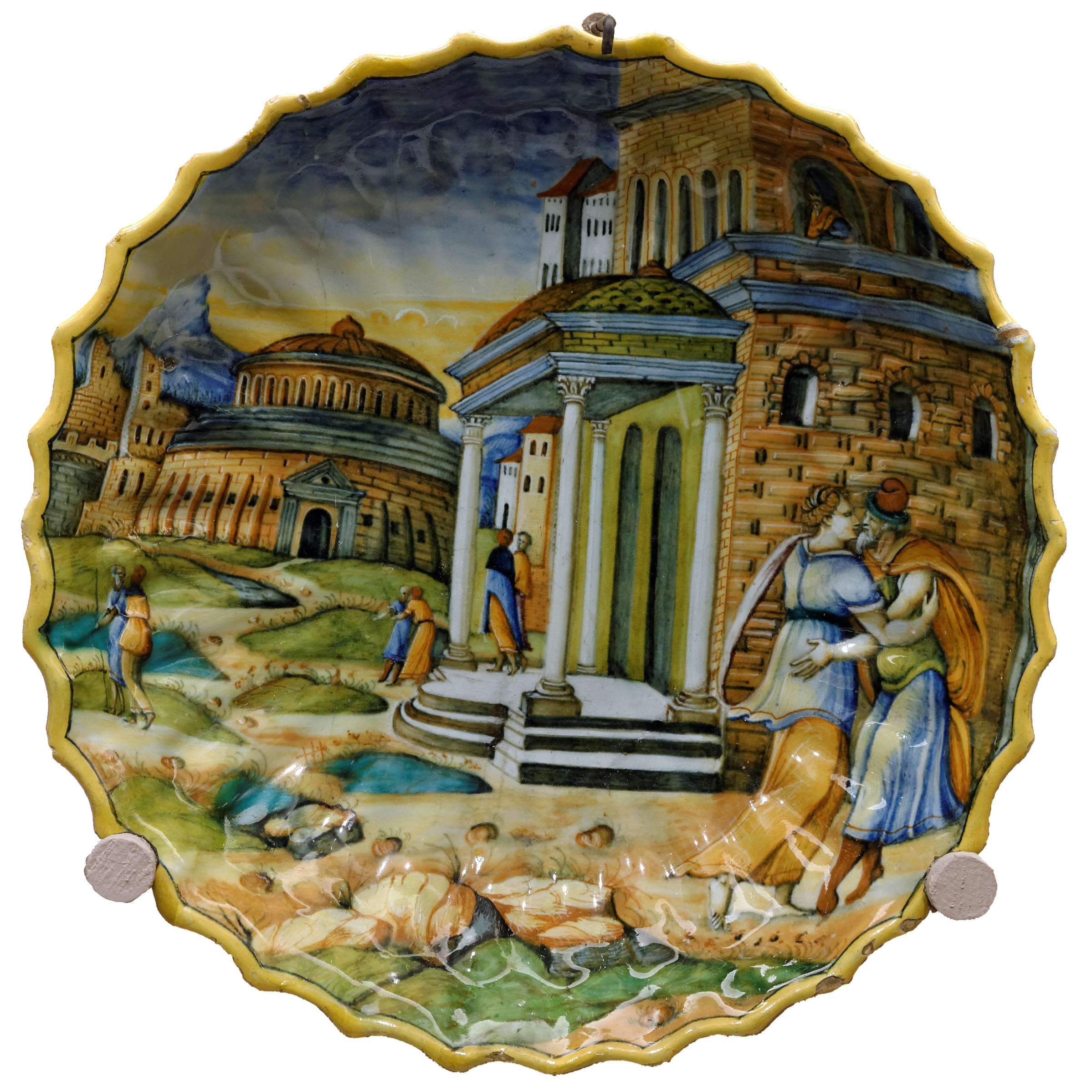 Abimélech épiant Isaac et Rébecca - Coupe godronnée à bord dentelé (majolique, Urbino ou Lyon).